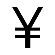 Gemaakt met The GIMP. Bestandsformaat: pngcrushed grayscale PNG 180x180. Font: (190pt) NimbusSanL-Regu 1.05 CreationDate: Wed Dec 22 1999 Copyright (URW)++,Copyright 1999 by (URW)++ Design & Development (URW)++,Copyright 1999 by (URW)++ Design & Development See the file COPYING (GNU General Public License) for license conditions. As a special exception, permission is granted to include this font program in a Postscript or PDF file that consists of a document that contains text to be displayed or printed using this font, regardless of the conditions or license applying to the document itself.